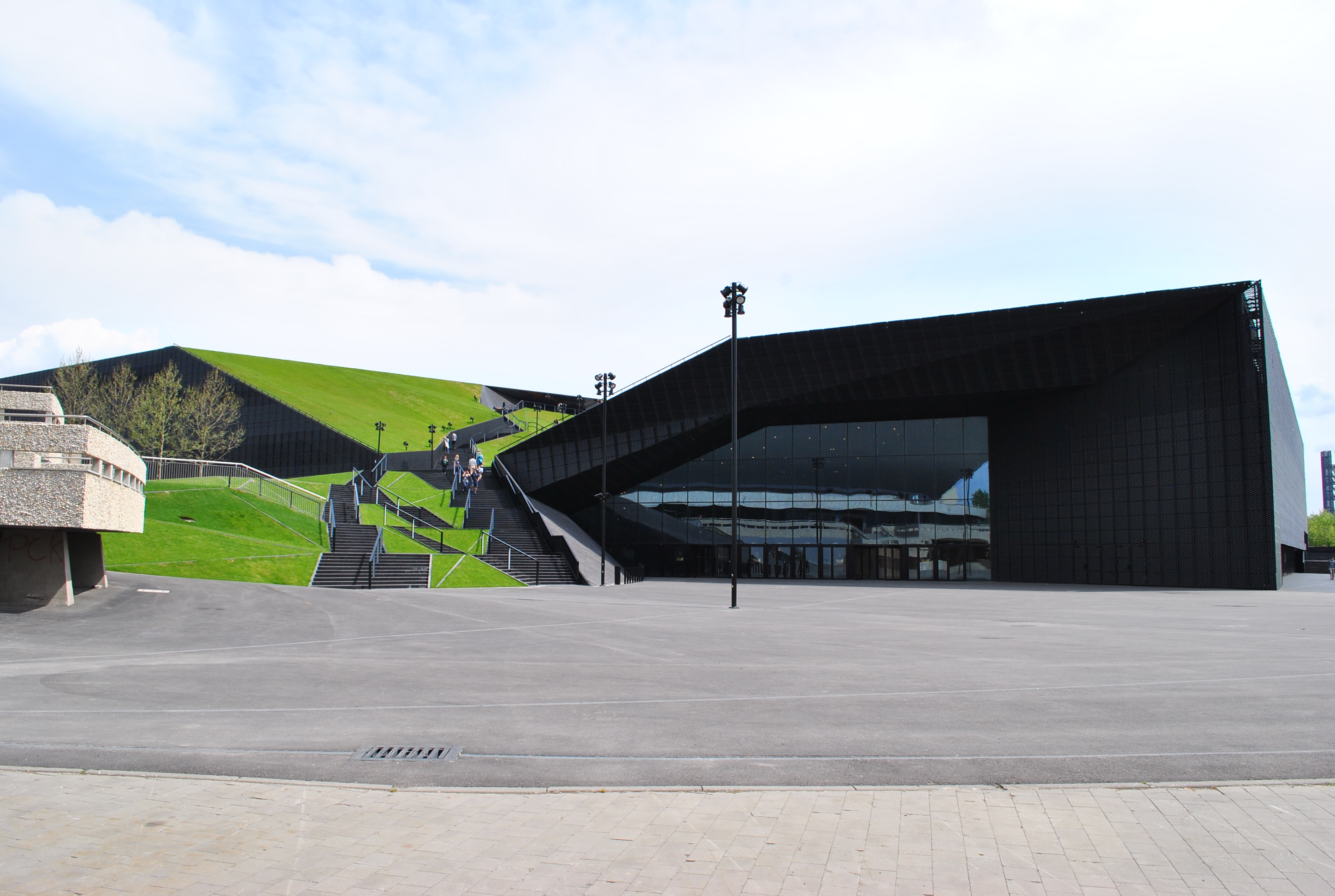 Międzynarodowe Centrum Kongresowe w Katowicach